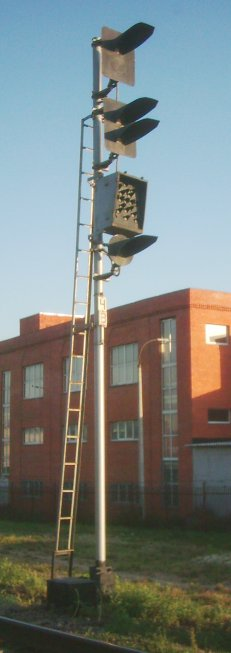 Современный входной сигнал в России, с маршрутным указателем